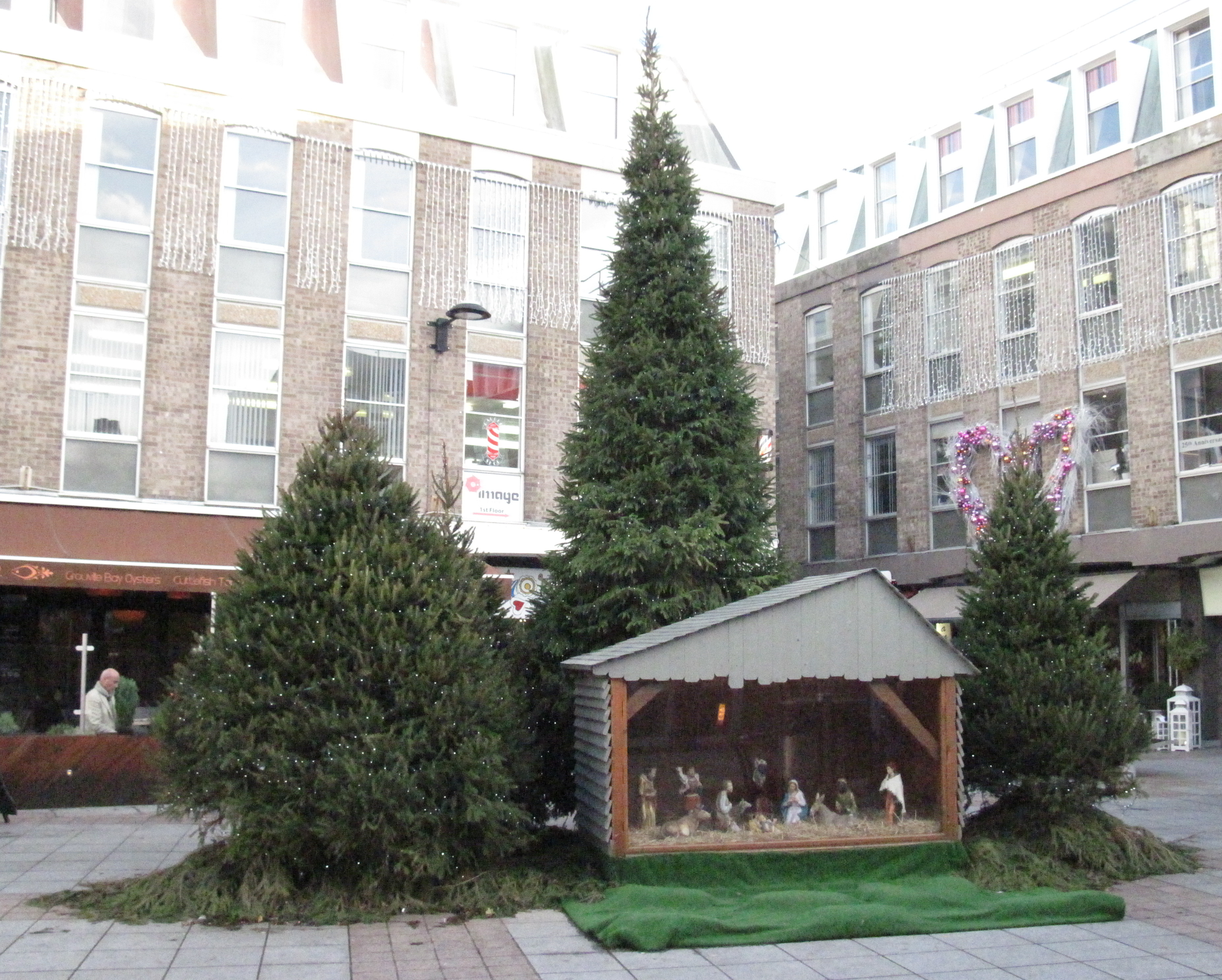 Nrf: Noué en Jèrri, Dézembre 2009